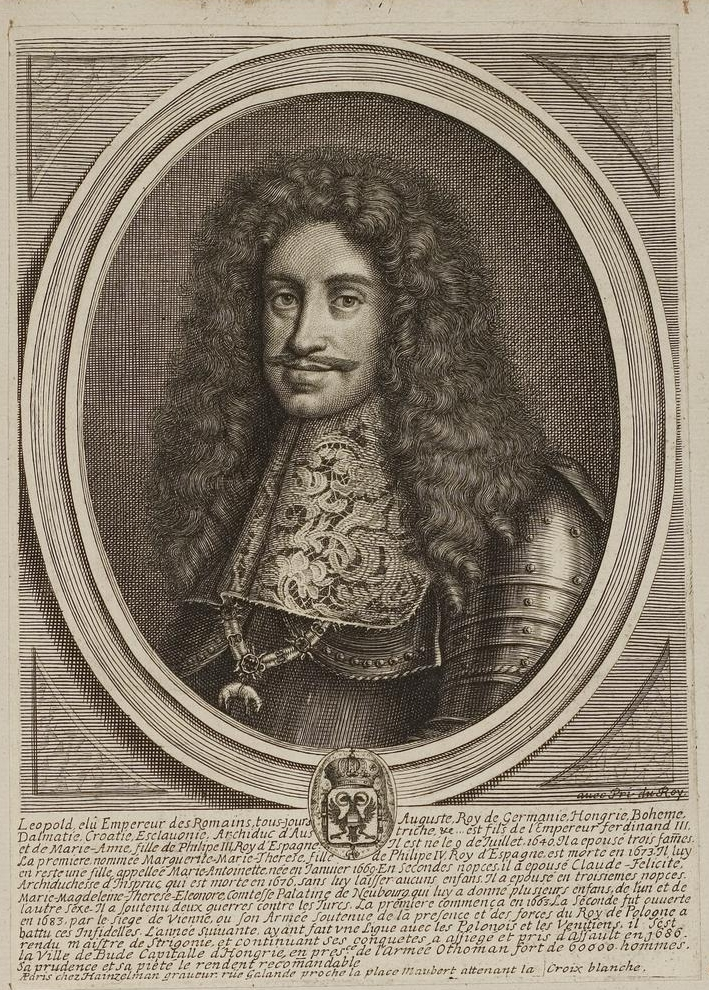 Grafik aus dem Klebeband Nr. 1 der Fürstlich Waldeckschen Hofbibliothek Arolsen Motiv: Kaiser Leopold I.